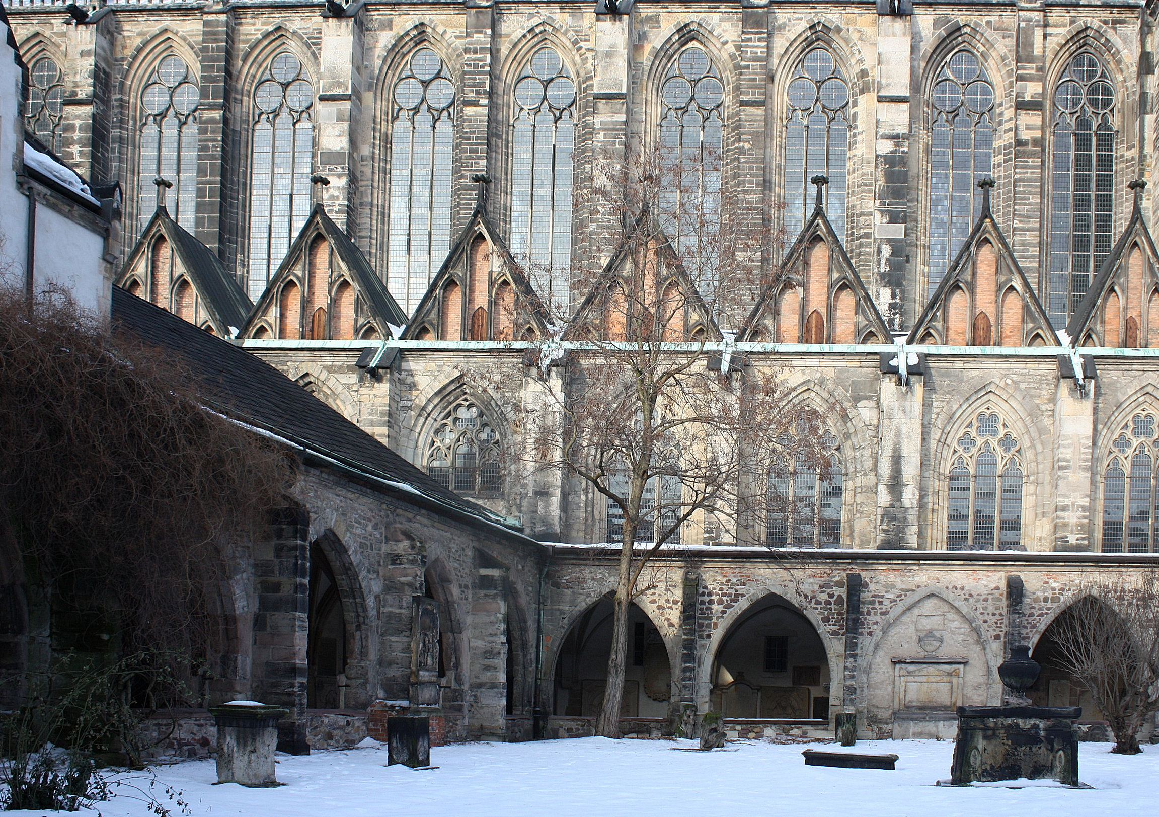 Magdeburg, Südfront des Domes, vom Kreuzgang aus gesehen